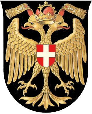 Wappen der Reichshaupt- und Residenzstadt Wien 1461-1925 bzw. 1934-1938